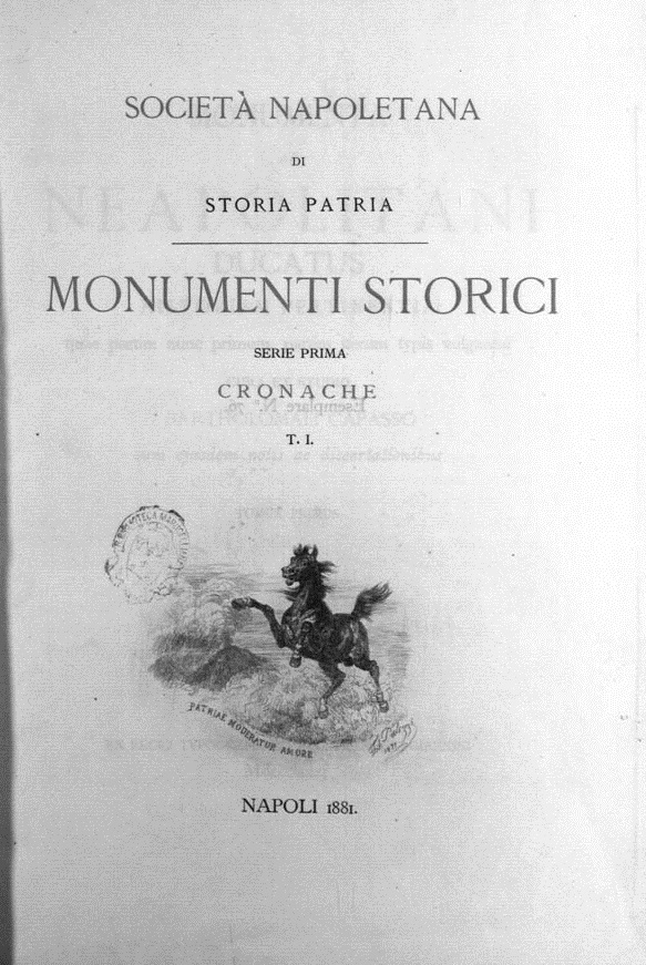 Frontespizio